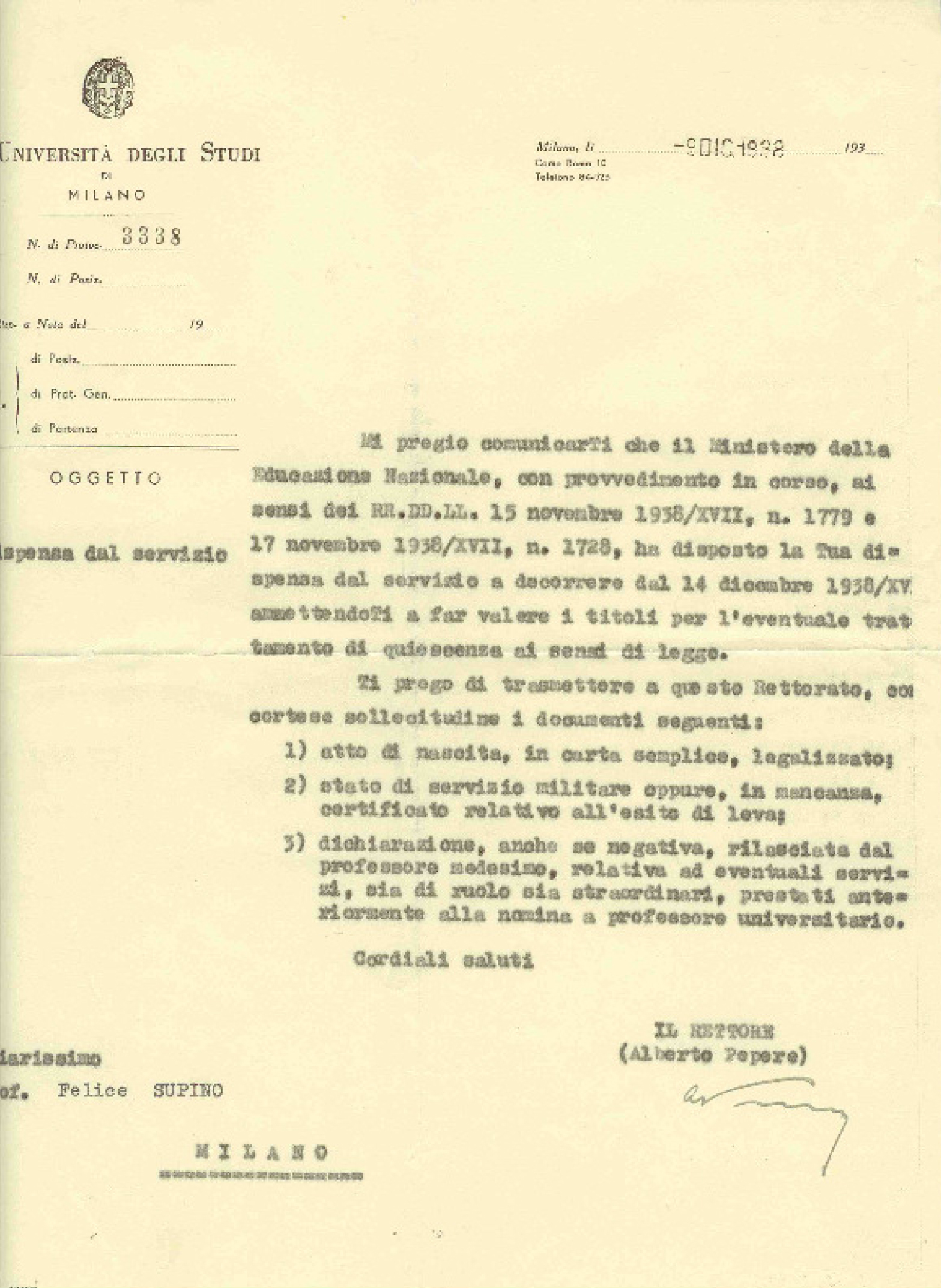 documento personale